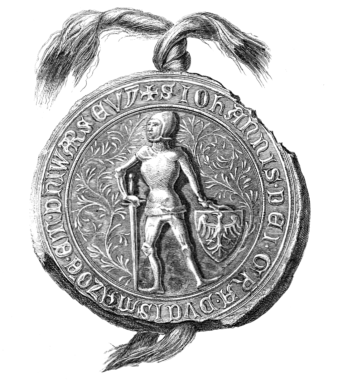 Janusz I Starszy seal